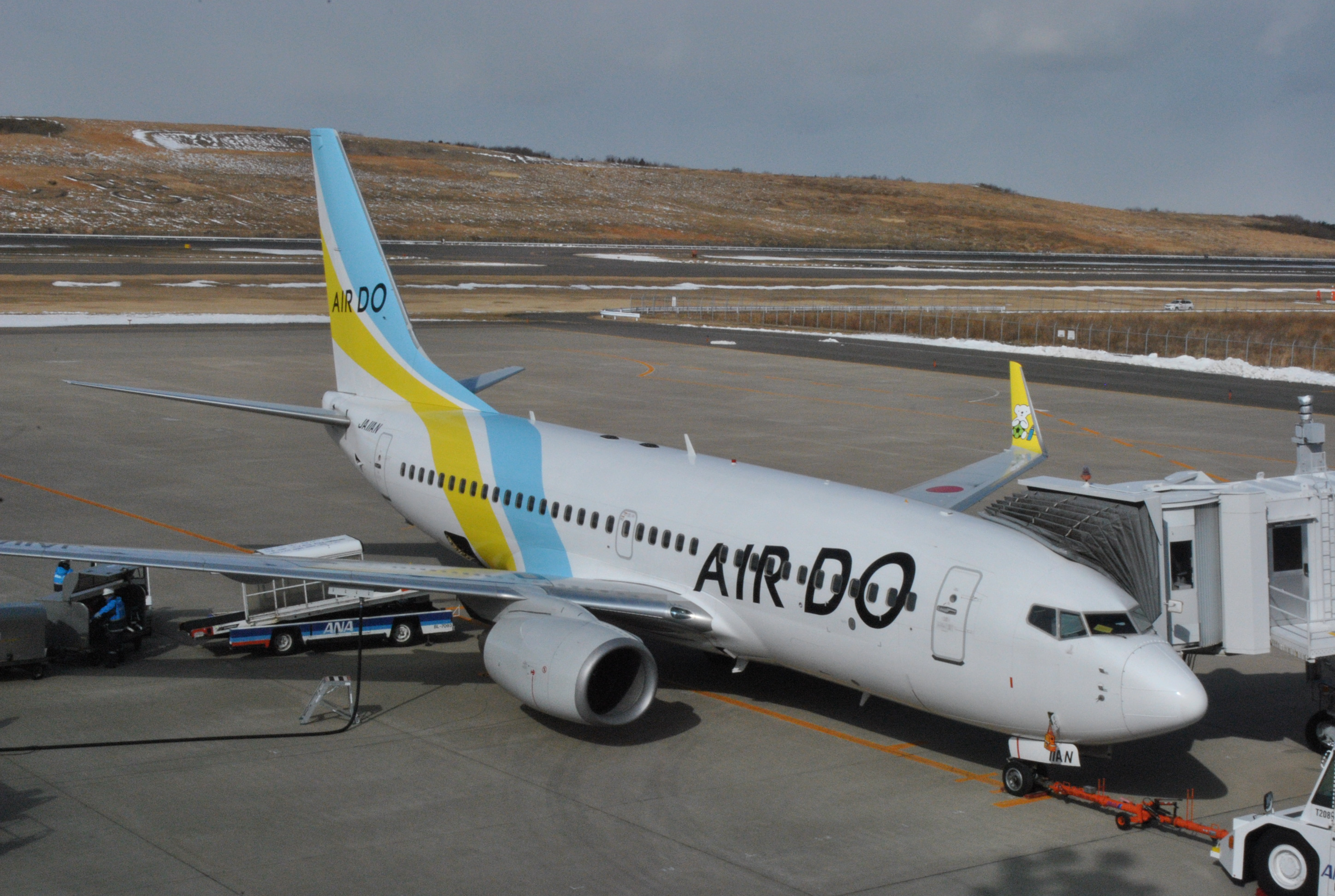 福島空港におけるAIRDO